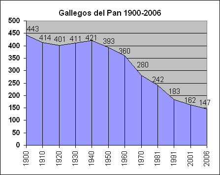 Población de Gallegos del Pan 1900-2006